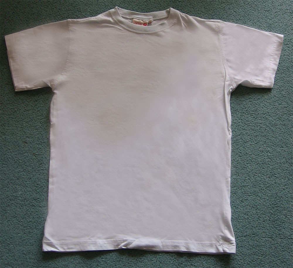 T-shirt